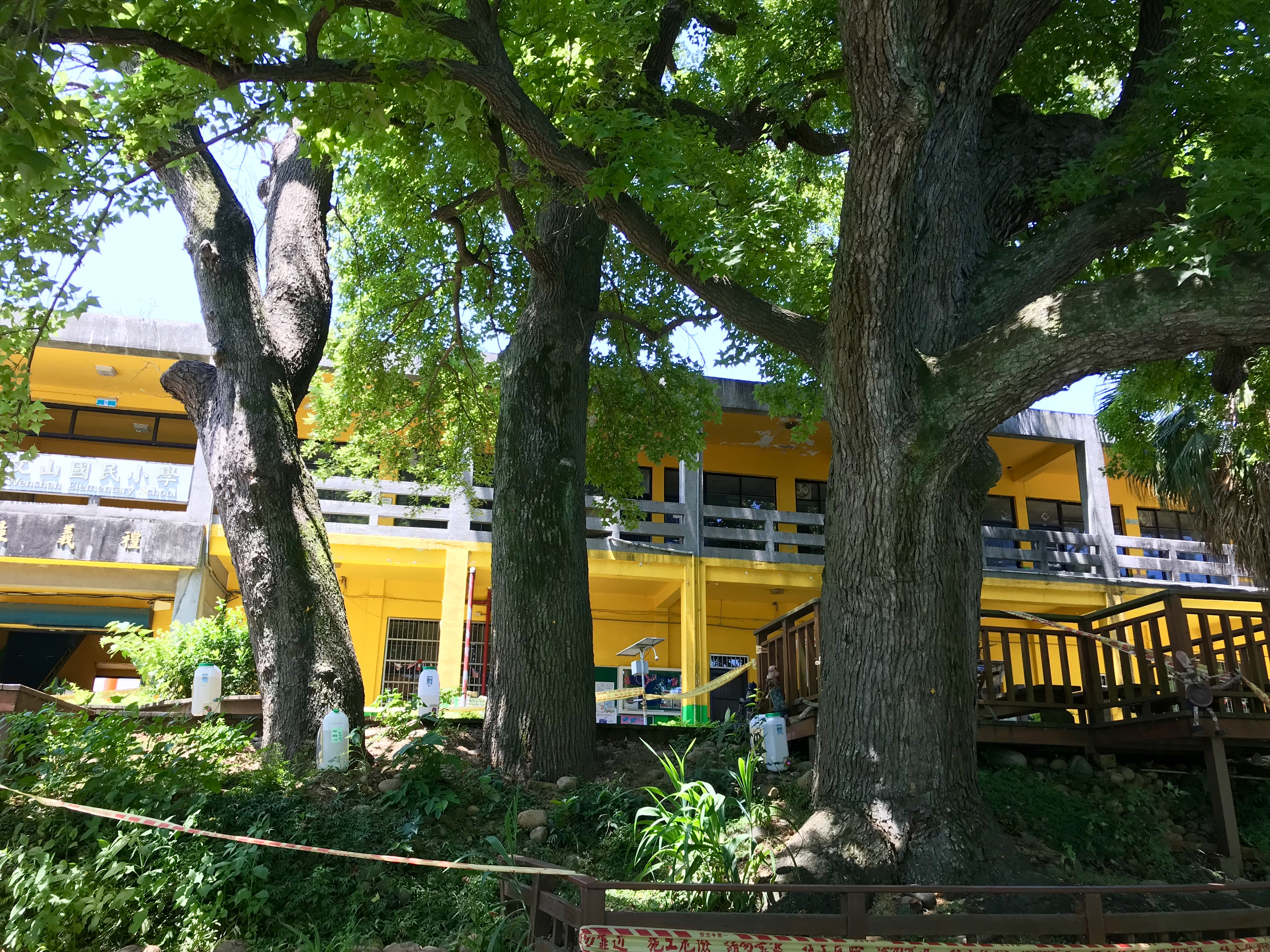 中文（台灣）: 文山國小楓樹伯公樹幹